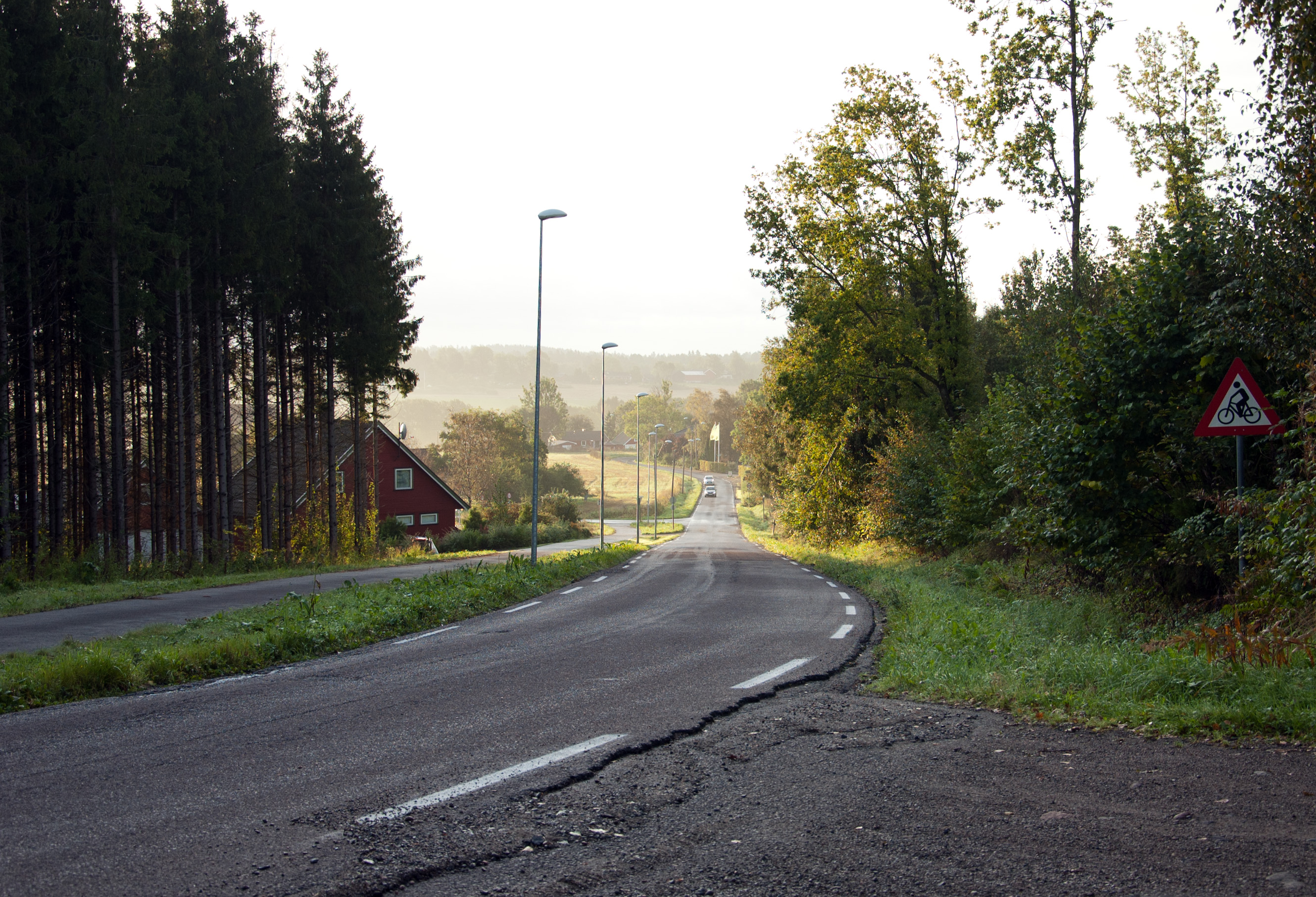 Fylkesvei 531 Robergveien i Tønsberg, Vestfold